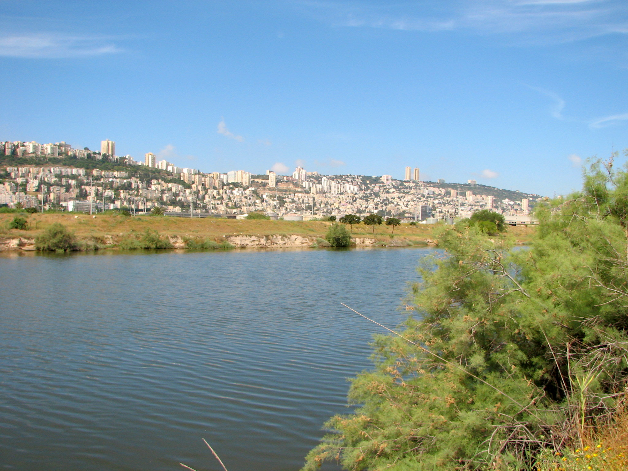 The Kishon River is a river in Israel that flows into the Mediterranean Sea at the city of Haifa.His length is 70 km. נחל קישון זורם מג'נין שבשומרון, לאורך כ-70 ק"מ, דרך עמק יזרעאל, מפער הקישון (המעבר הצר בין הכרמל לגבעות אלונים שפרעם) ועמק זבולון, עד יציאתו לים במפרץ חיפה. בשפך הנחל נמצא נמל הקישון. שטח אגן הניקוז שלו הוא השני בגודלו מבין נחלי החוף, כ-1,110 קמ"ר ולאורך חלק ניכר מאפיקו זרימתו איתנה. הנחל סבל מזיהום רב במיוחד באפיקו התחתון. בתחילת שנות ה2000 עבר הנחל שיקום באמצעות רשות נחל קישון והדגה והעופות חזרו לנחל פארק הקישון, מבט לדרום מערב לכוון חיפה